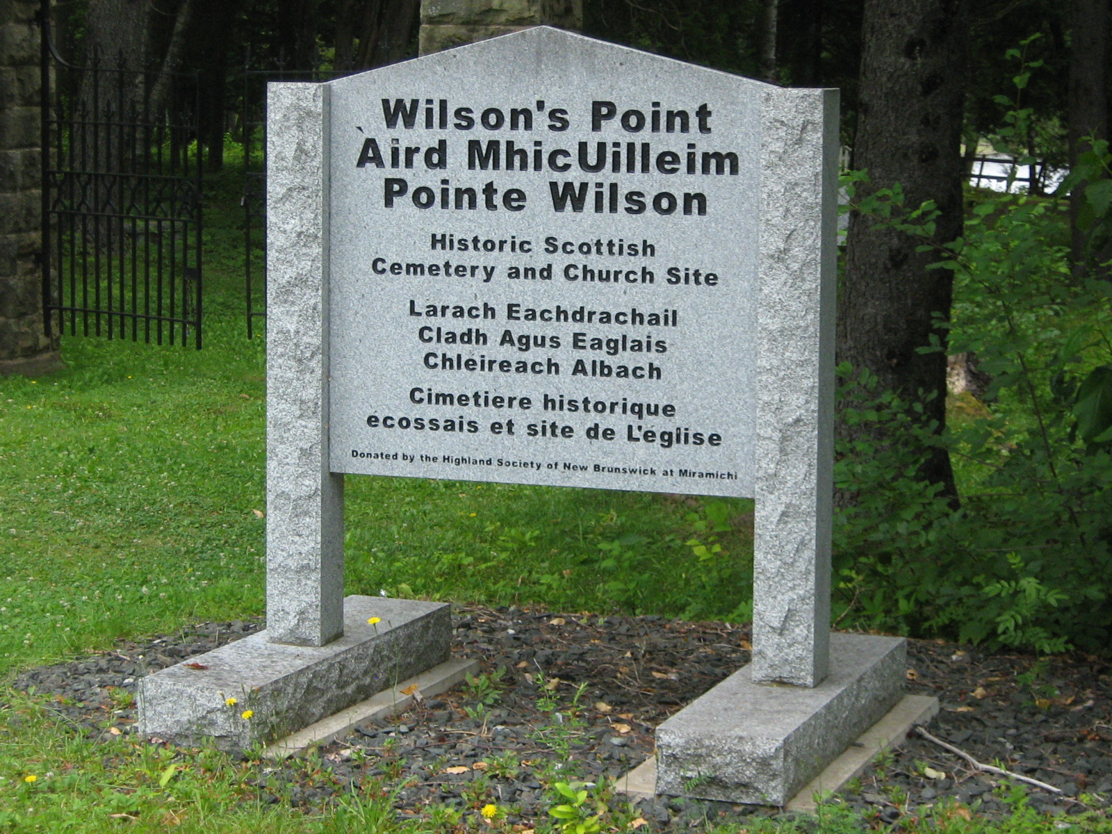 Pointe Wilson's, Route 8, Derby (Canada). (Protection LPP. Voir la liste des lieux patrimoniaux du comté de Northumberland (Nouveau-Brunswick) pour plus de détails).